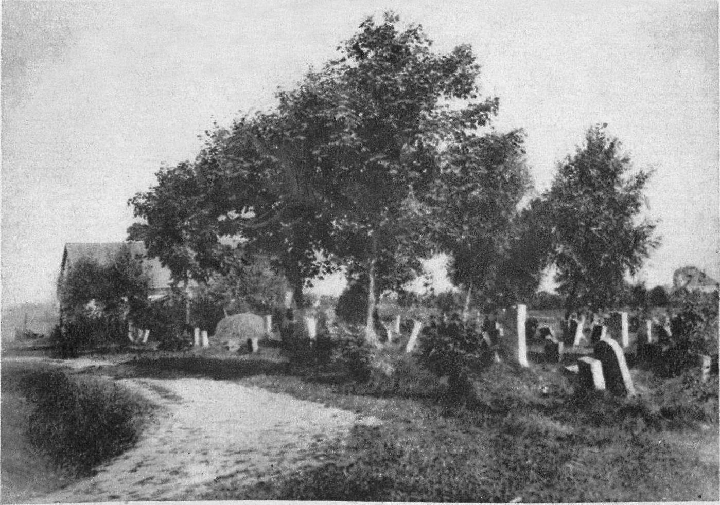 Кульпарковское еврейское кладбище во Львове.